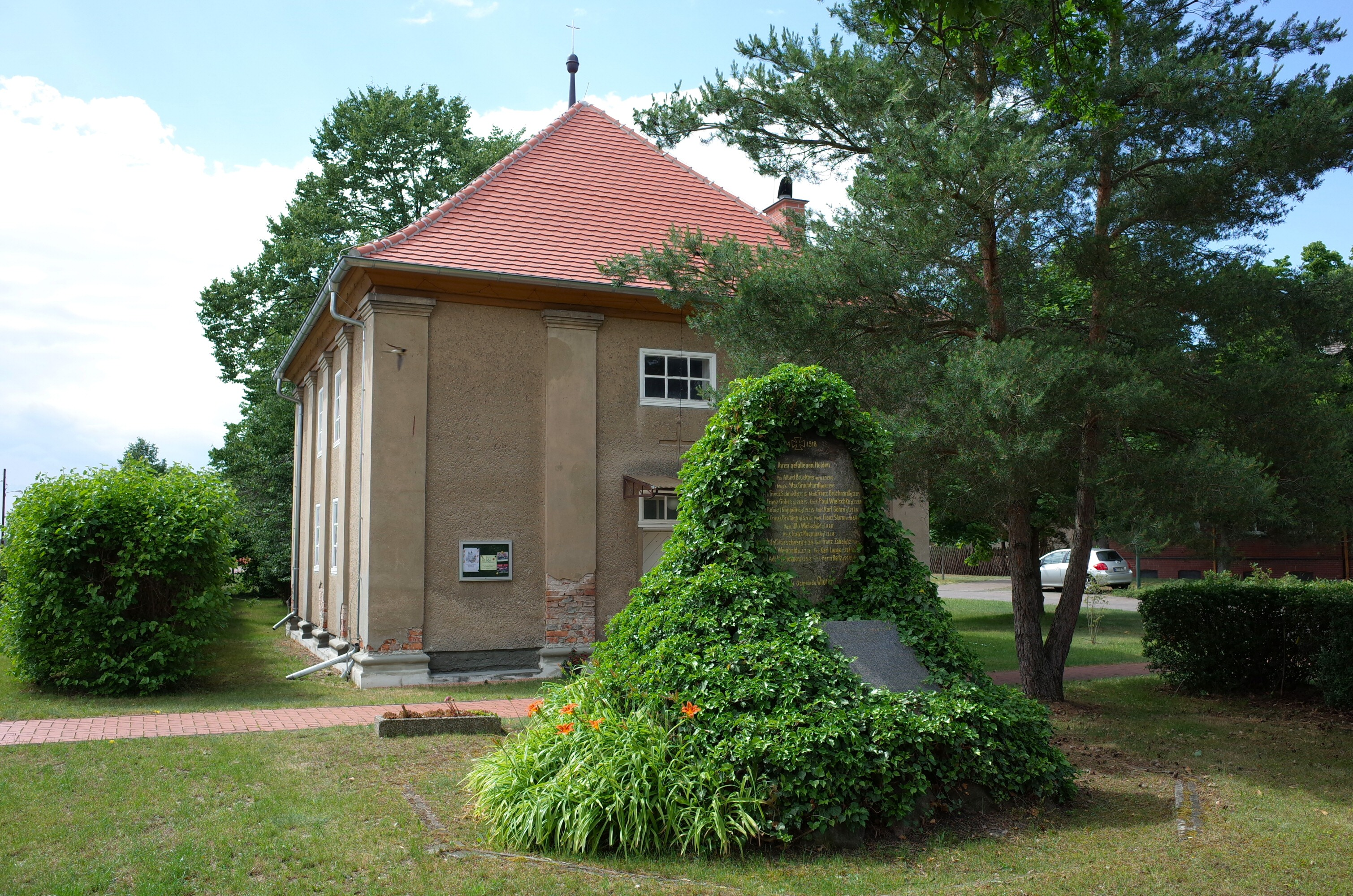 Chörau, Kriegerdenkmal vor dem Bethaus.